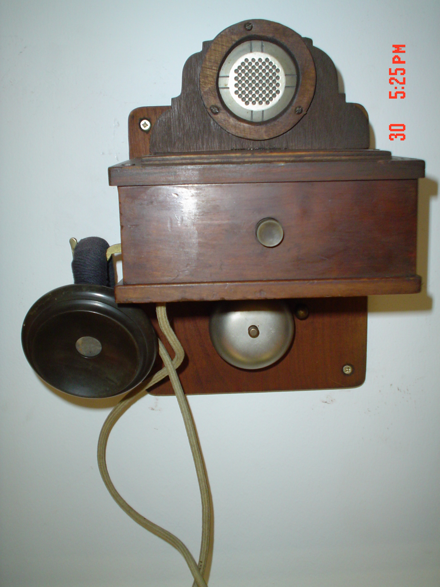 Mura lignoskatola telefono